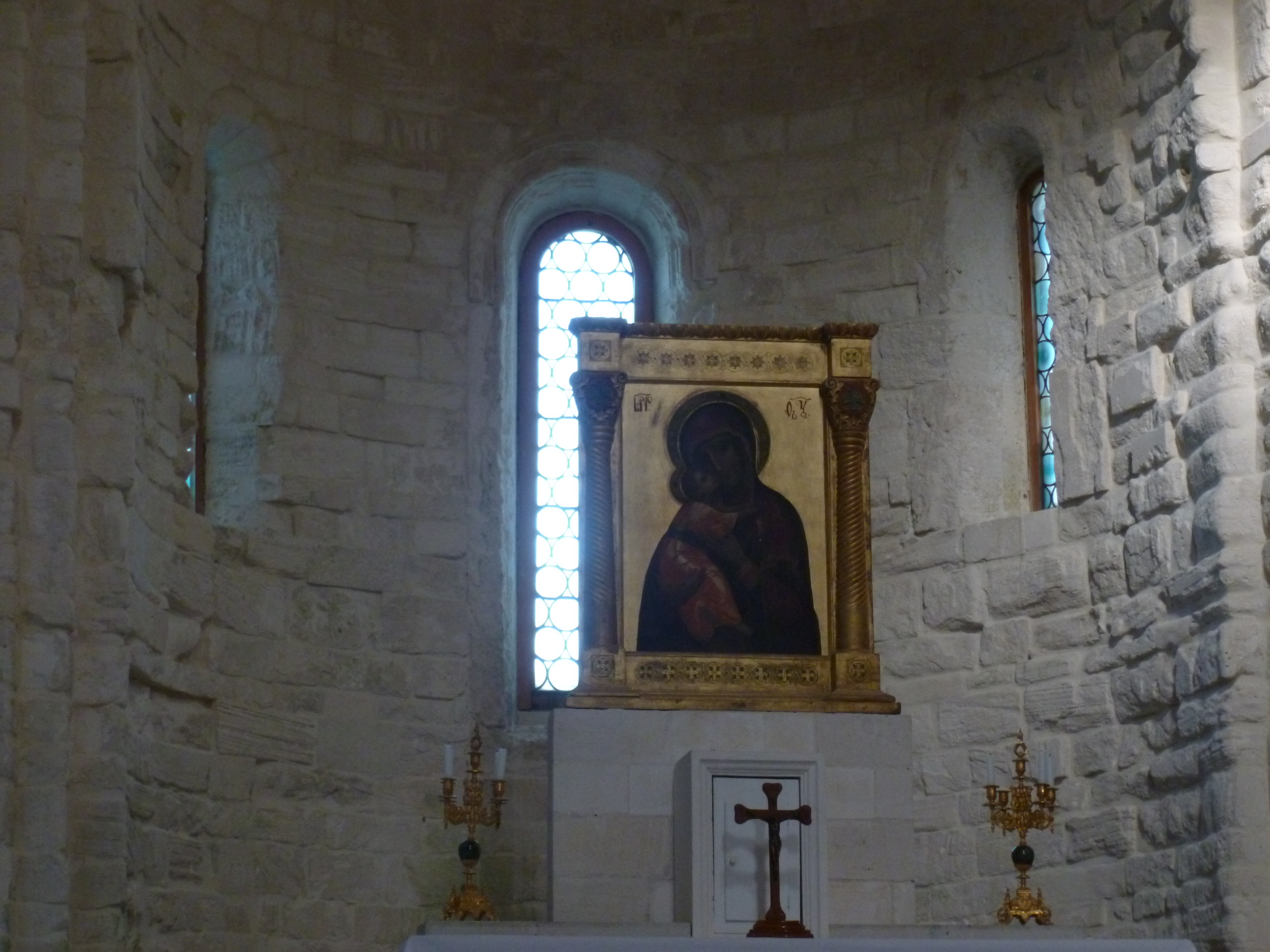 Chiesa di Santa Maria di Portonovo This is a photo of a monument which is part of cultural heritage of Italy.